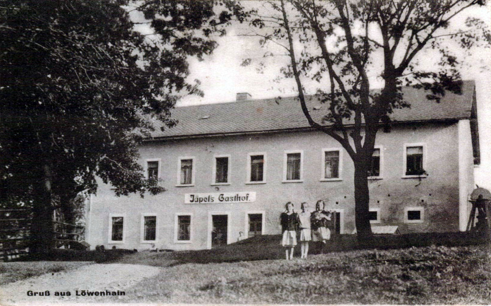 Jäpels Gasthof in Löwenhain (Geising/Altenberg)